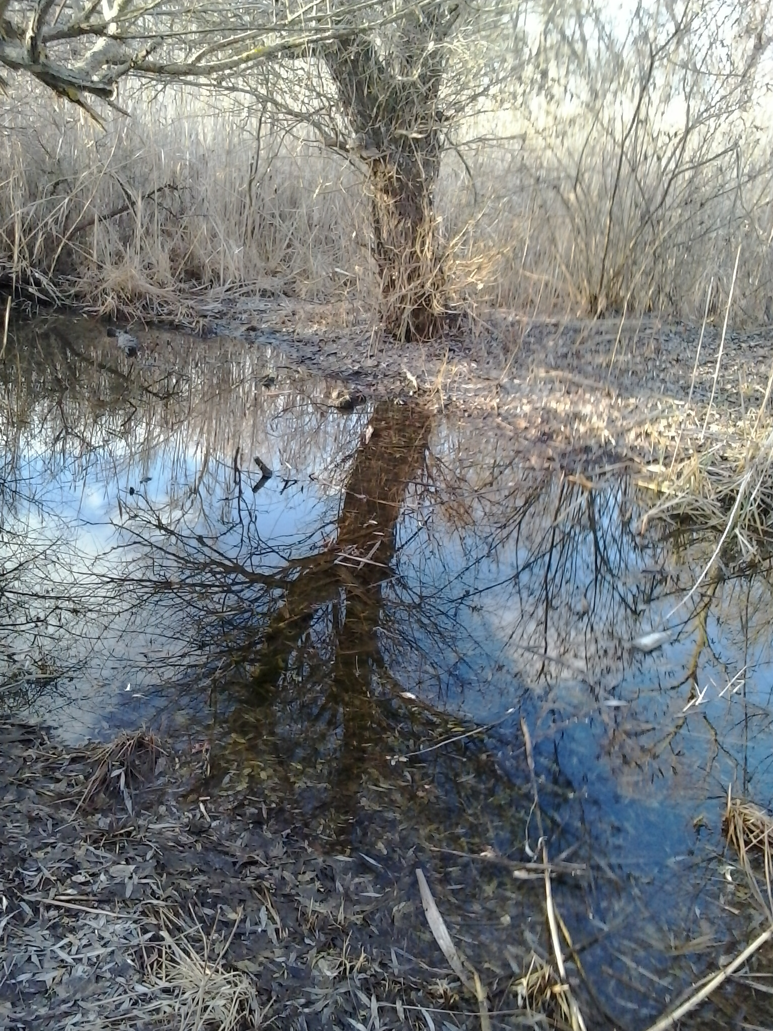 Одинокое дерево